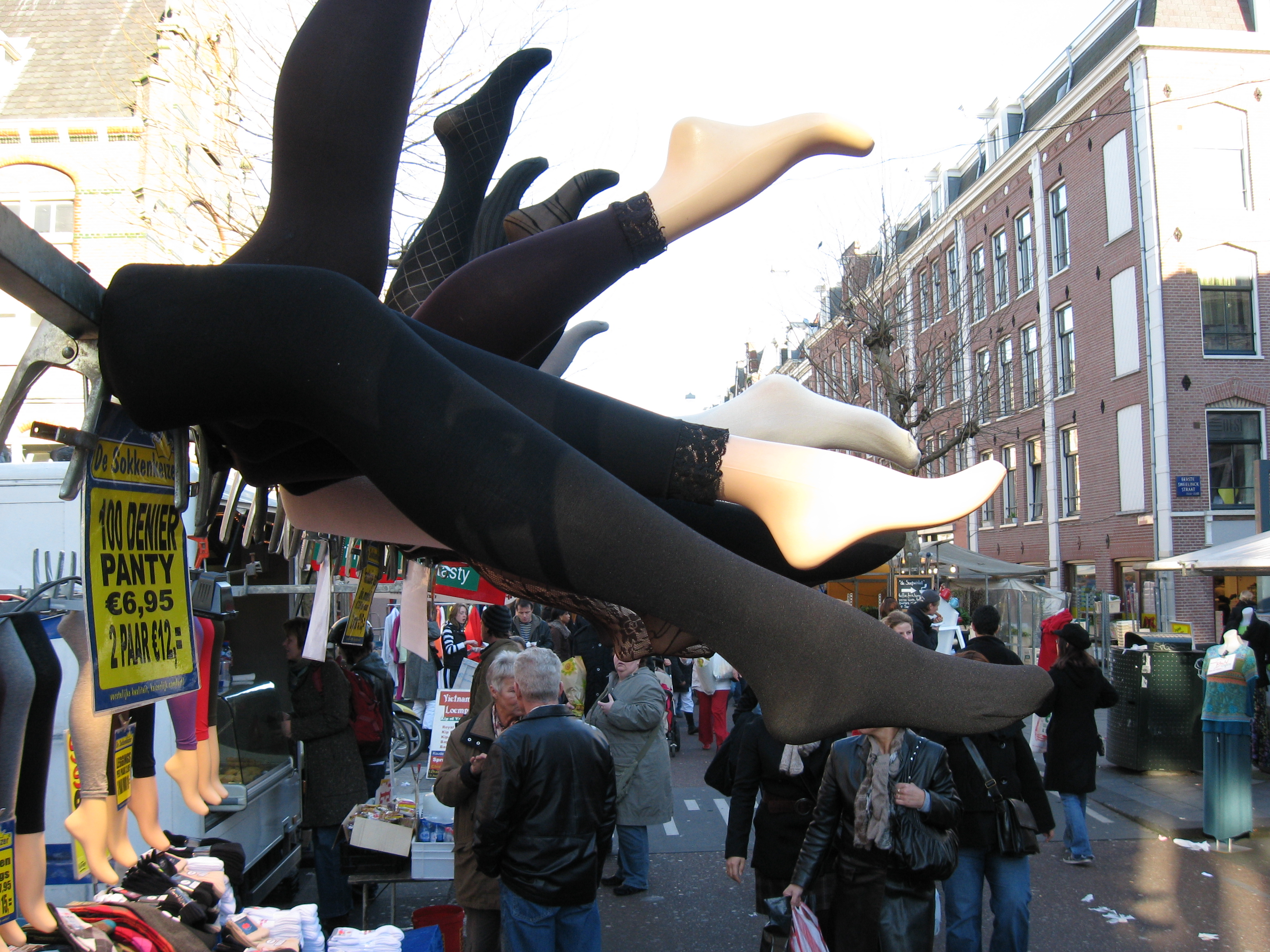 A temporary shop selling pantyhose in Albert Cuyp Markt, Amsterdam (which is de rigeur on weekends).